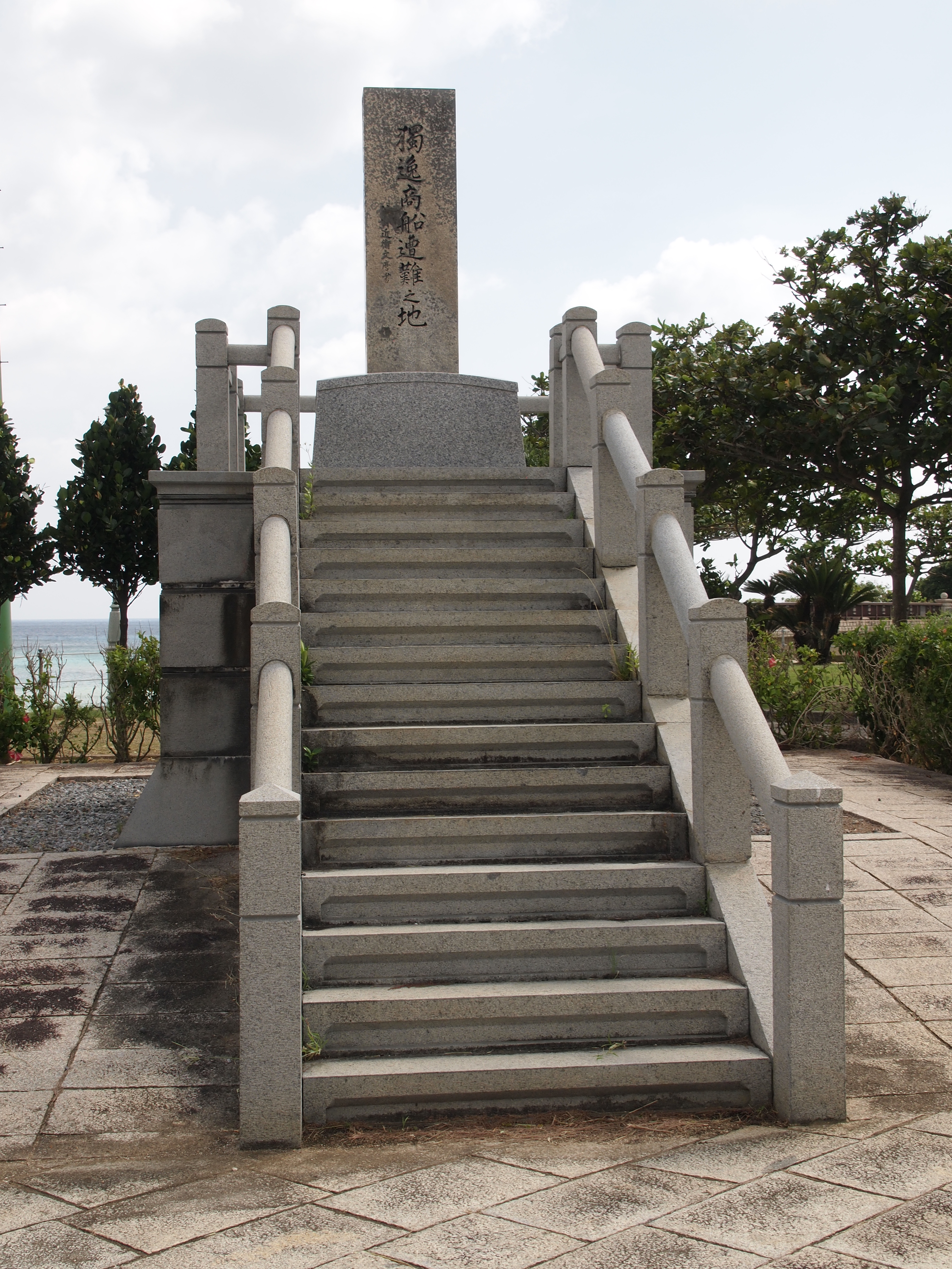 ドイツ商船遭難之地碑（沖縄県宮古島市宮古島）